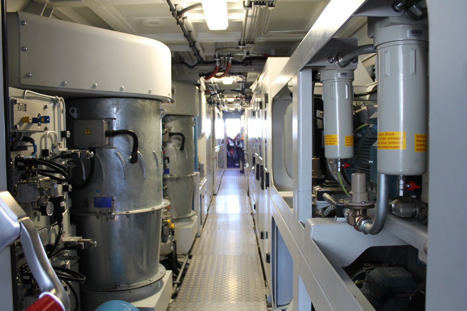 Przedział maszynowy w elektrowozie E6ACT-008 podczas targów Trako 2015. The making of this document was supported by Wikimedia Polska Association, within Wikigrant no. WG 2015-34. English | polski | +/−